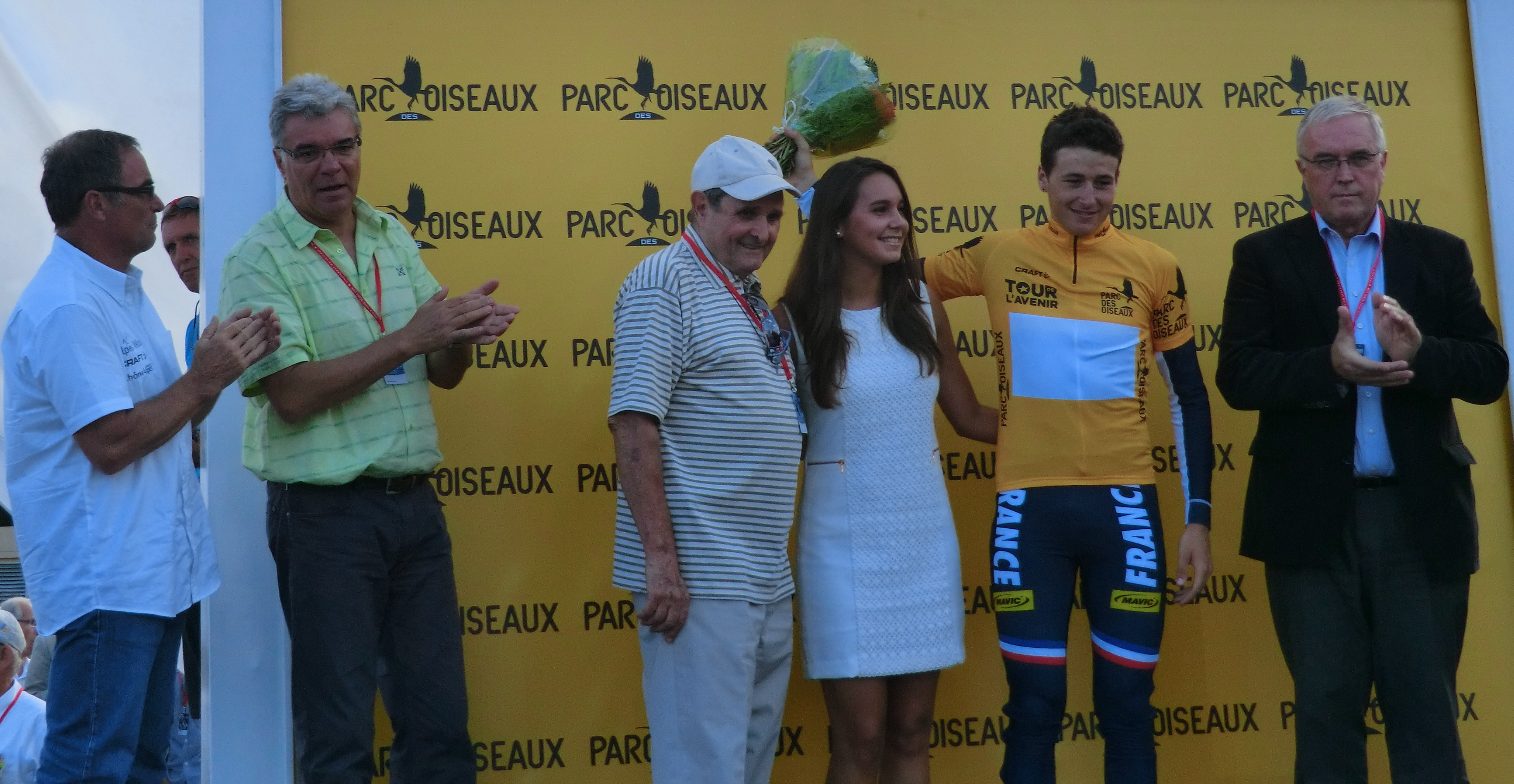 Podiums de la seconde étape du Tour de l'Avenir 2013 à Saint-Vulbas.